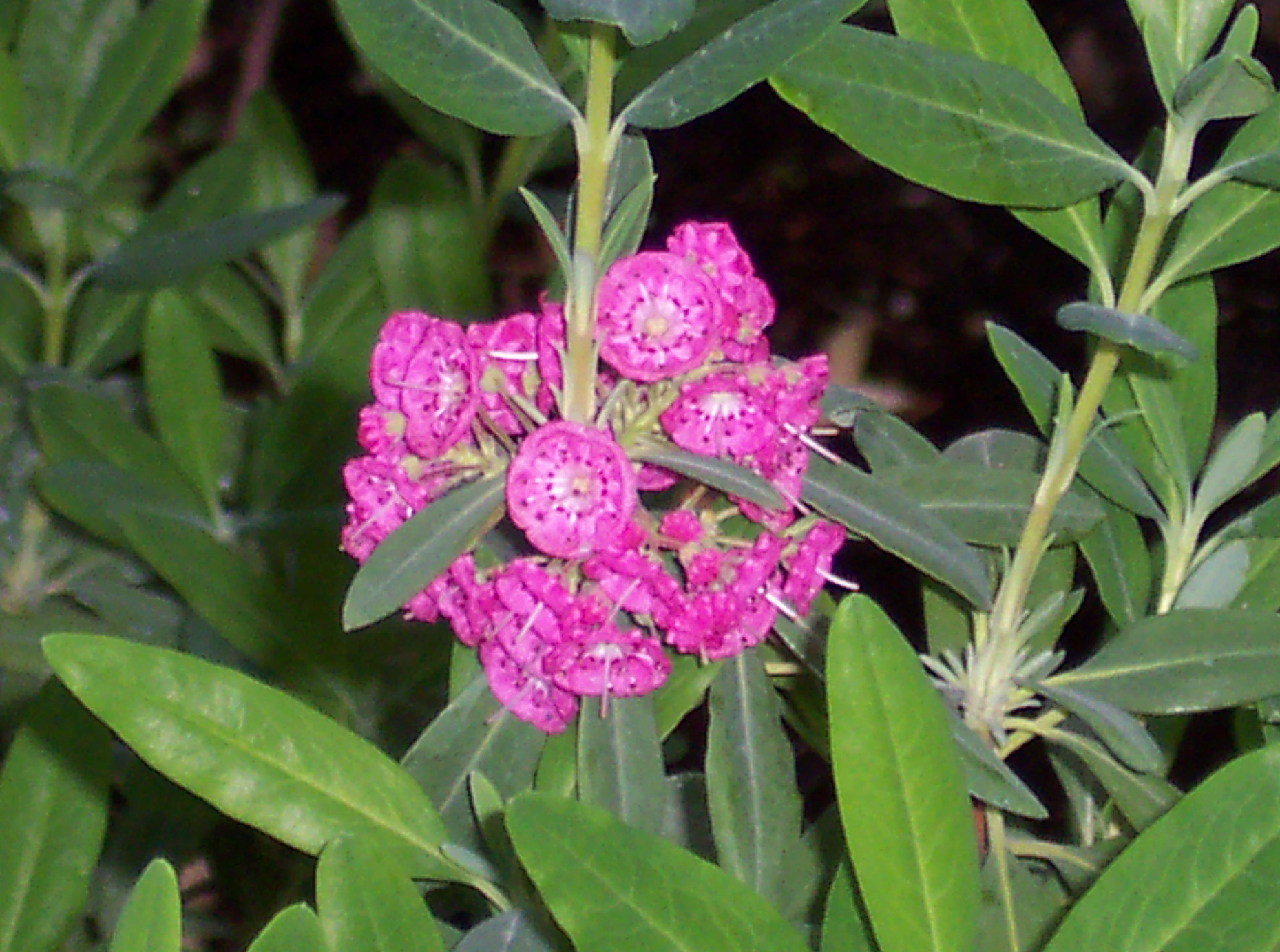 Kalmia angustifolia 'Rubra'. Real Jardín Botánico, Madrid.